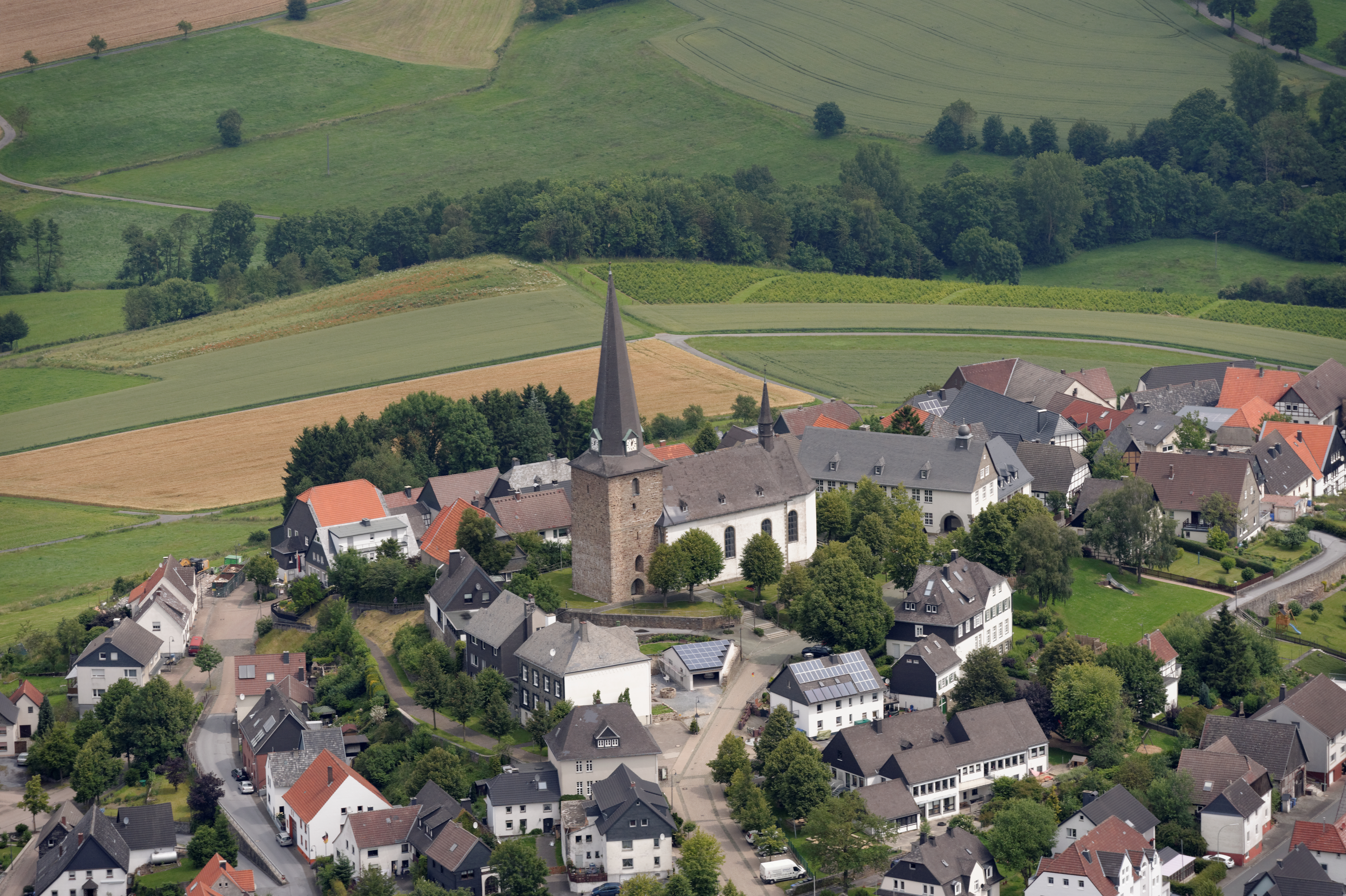 Fotoflug Sauerland Nord. Rüthen-Kallenhardt, Pfarrkirche St. Clemens, Blickrichtung Nordost The making of this document was supported by the Community-Budget of Wikimedia Germany.